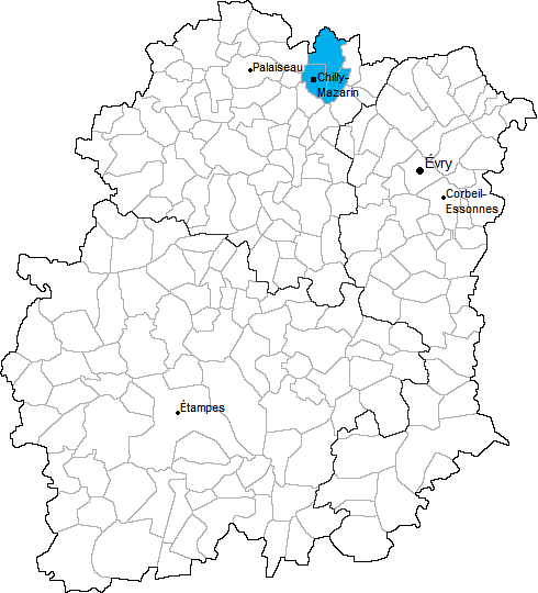 Carte de situation du canton de Chilly-Mazarin en Essonne (91)